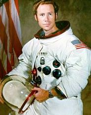 NASA Astronaut Donald Lee Holmquest